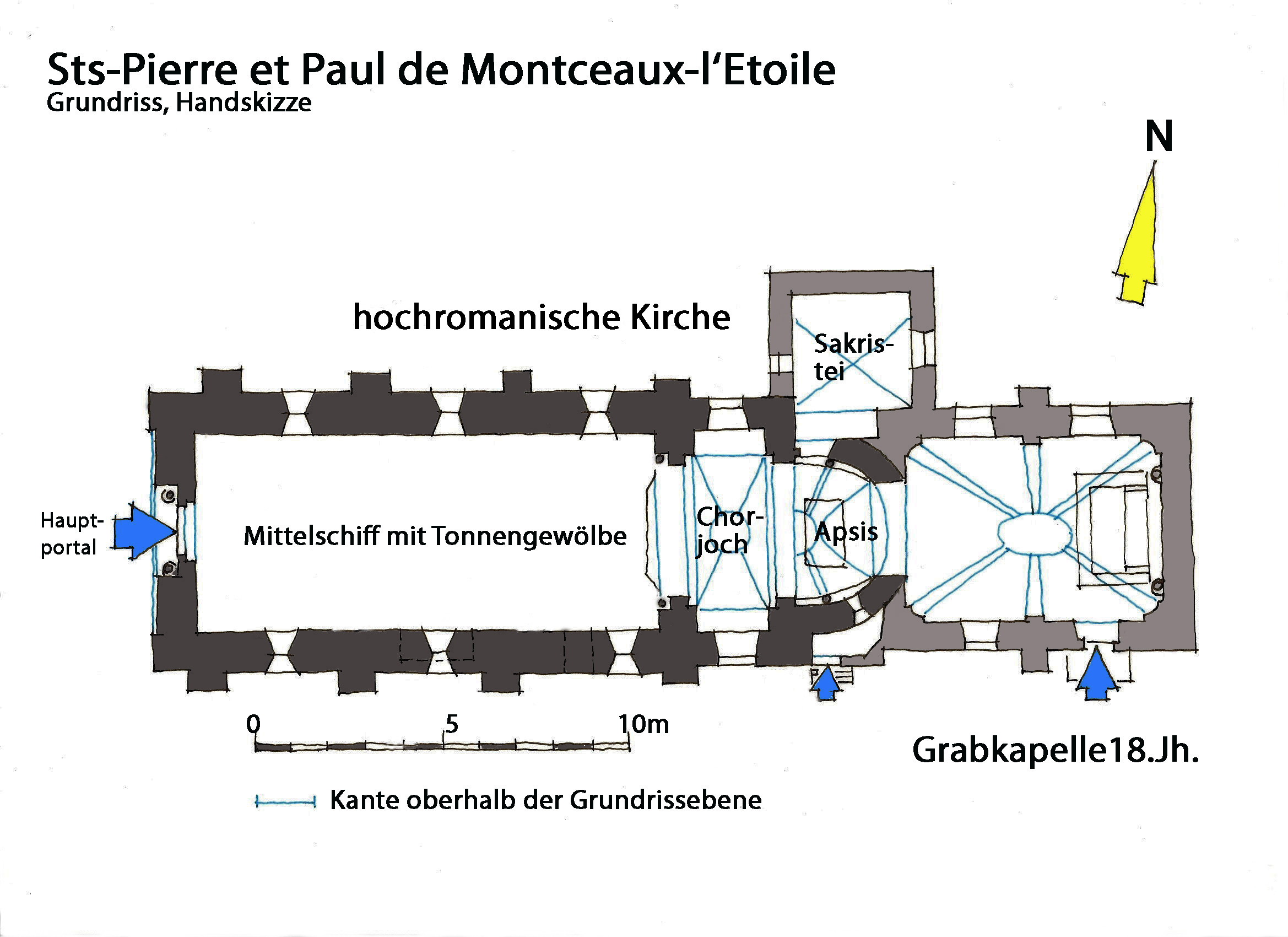 Monceaux-l'Étoile, Grundriss, Handskizze